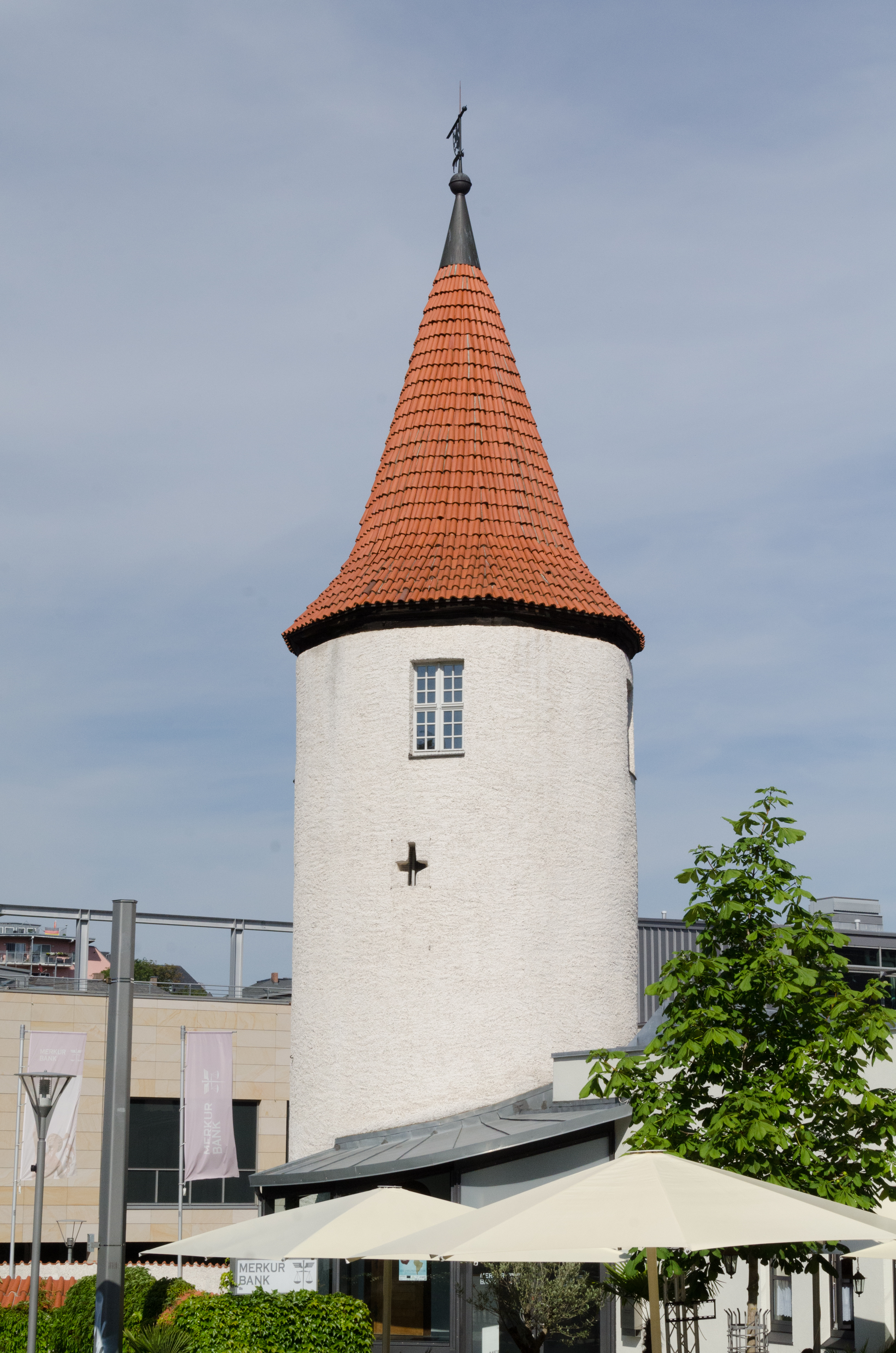 Plauen, Postplatz, Nonnenturm